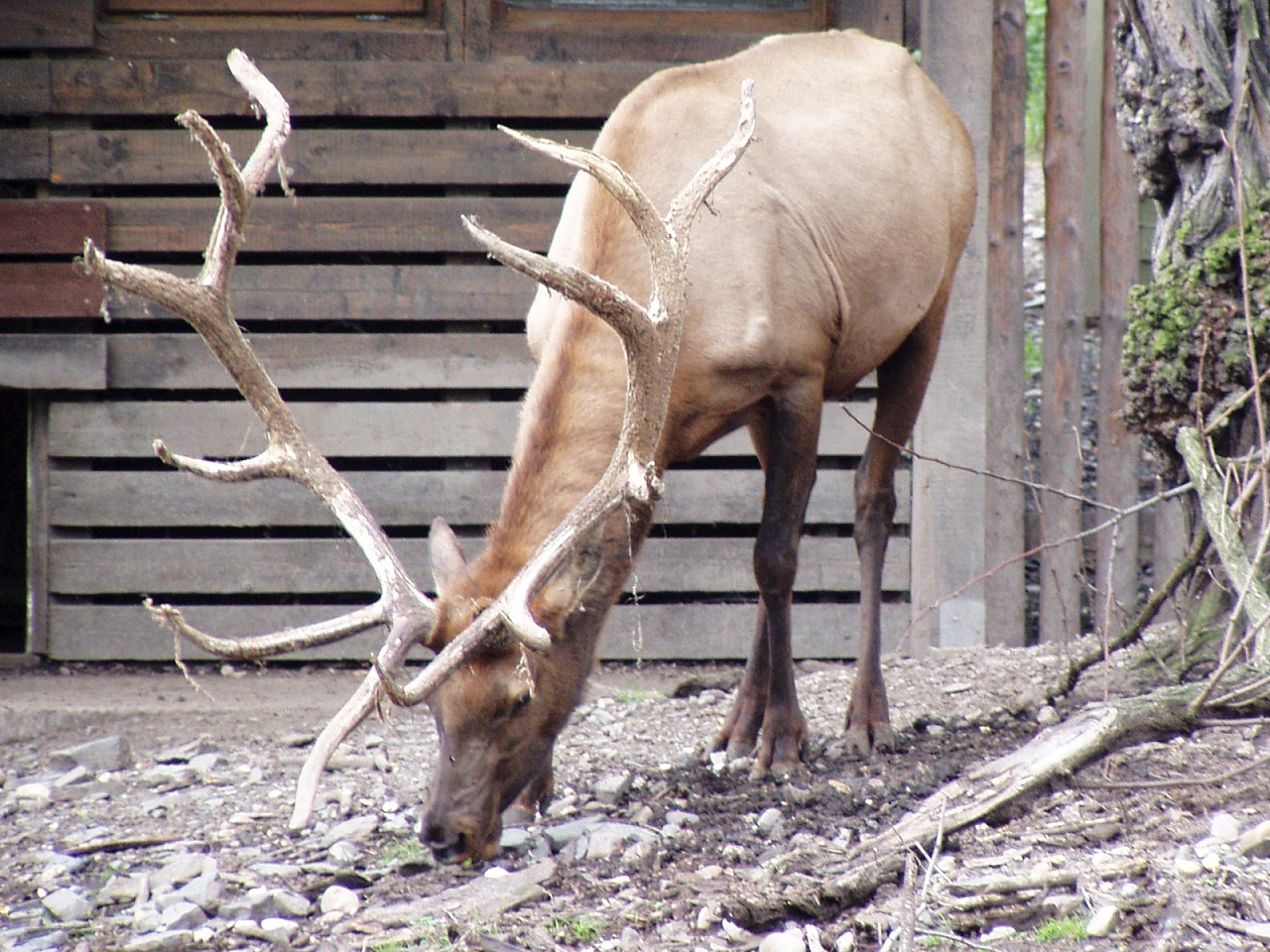 Cervus canadensis manitobensis (Prague Zoo)